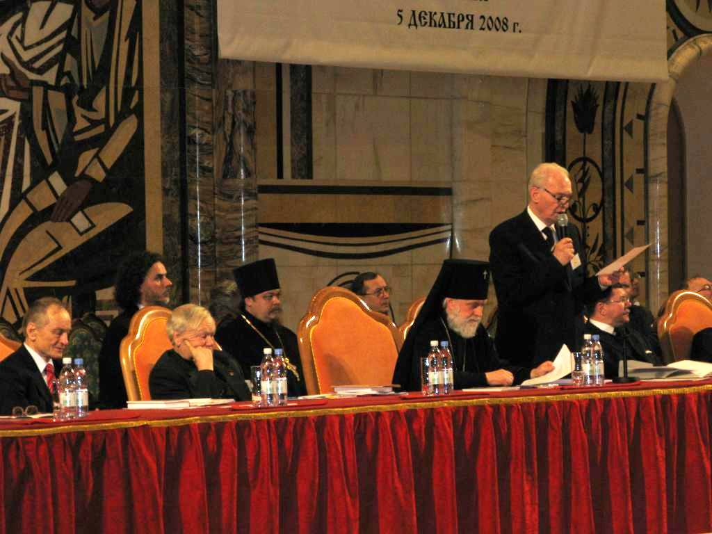 Кончина Его Святейщества Алексия II, 05 декабря, ХХС , Соборная встреча. Moscow, Russia